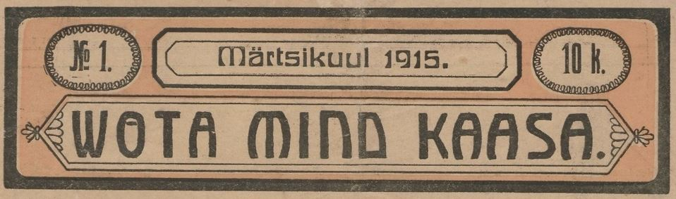 Võta mind kaasa 1915 nr 1 päis